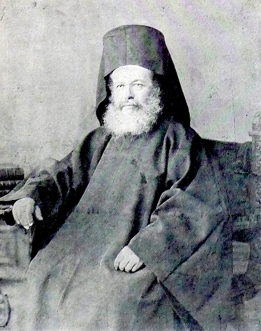 Патриарх Константинопольский Герман V